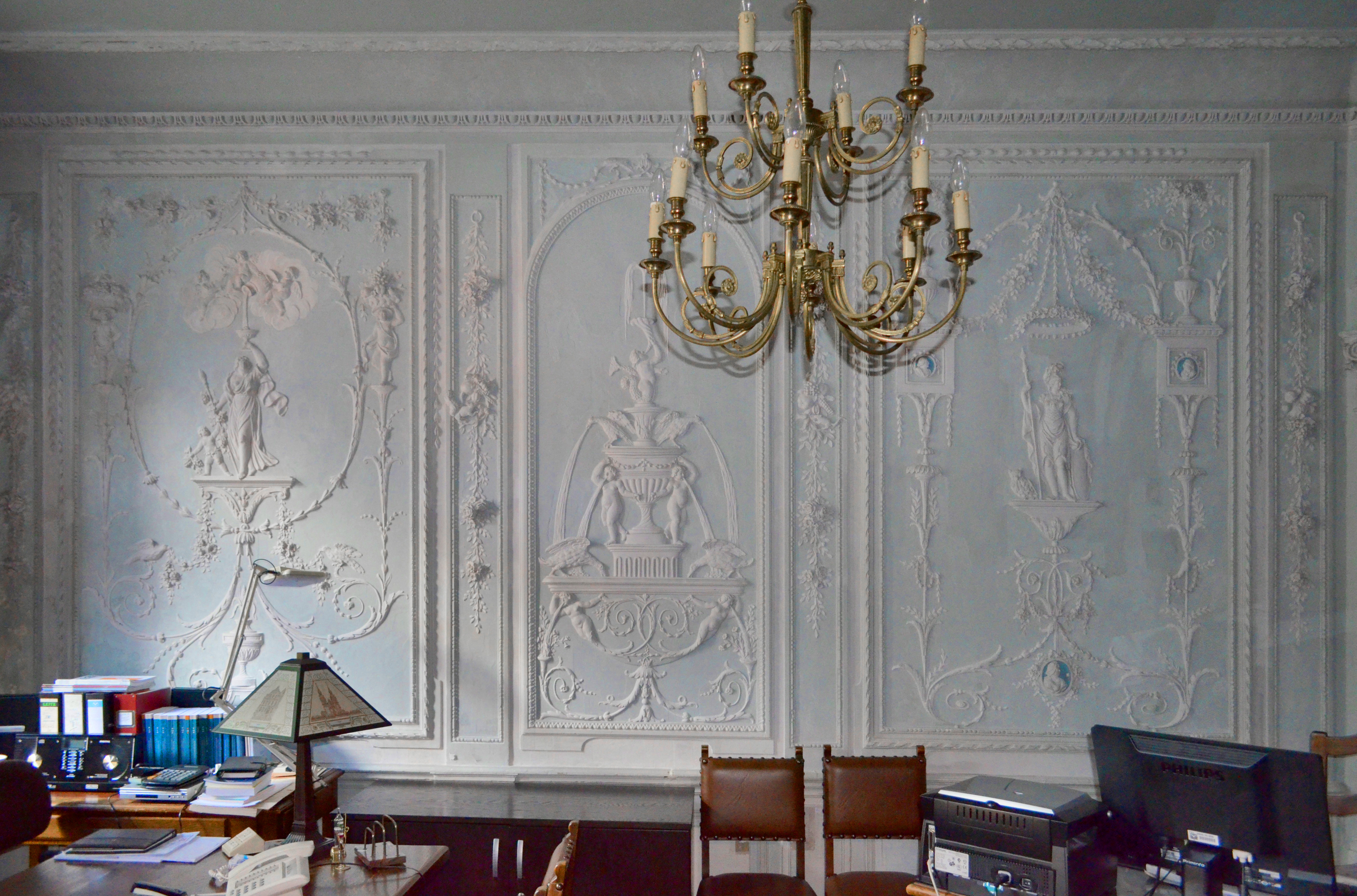 Friedensgericht in Eupen, Klötzerbahn 27, Gagini-Stuck im Erdgeschoss